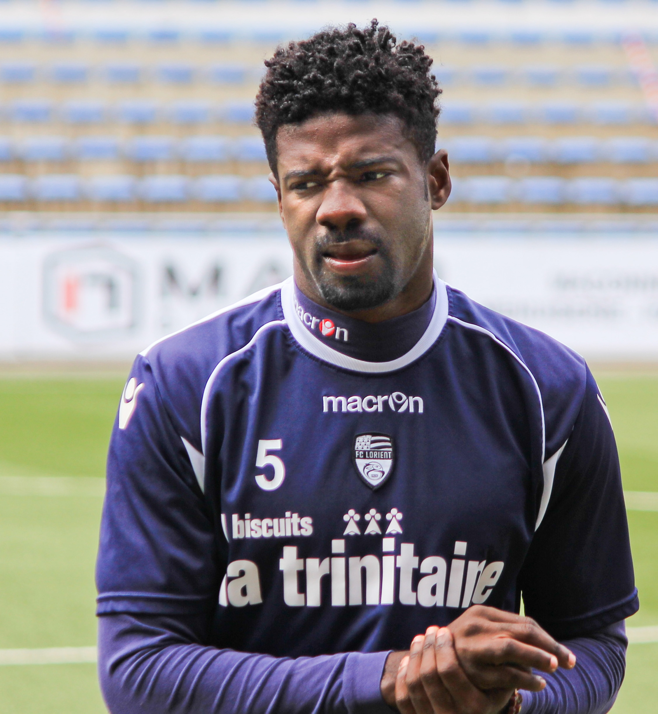 Bruno Ecuele Manga pendant un entrainement du FC Lorient le 24 mai 2013